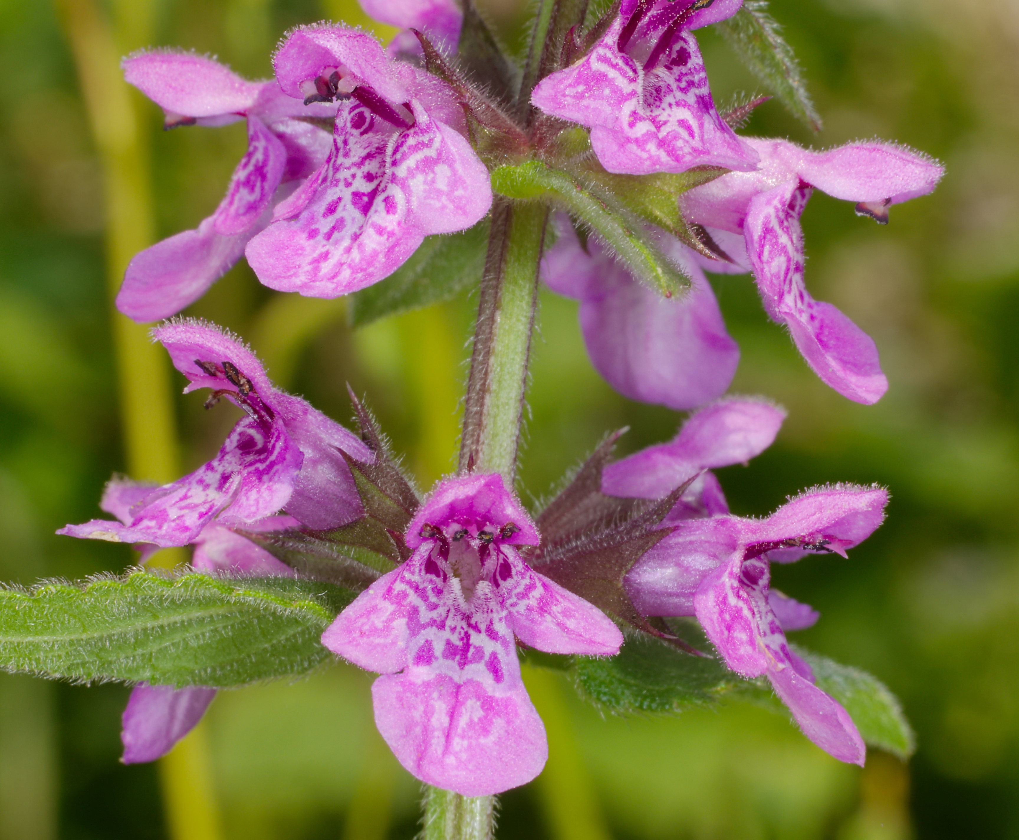 Sumpf-Ziest - Stachys palustris. Aufgenommen am Neckar in Mannheim-Feudenheim, Baden-Württemberg, Deutschland.